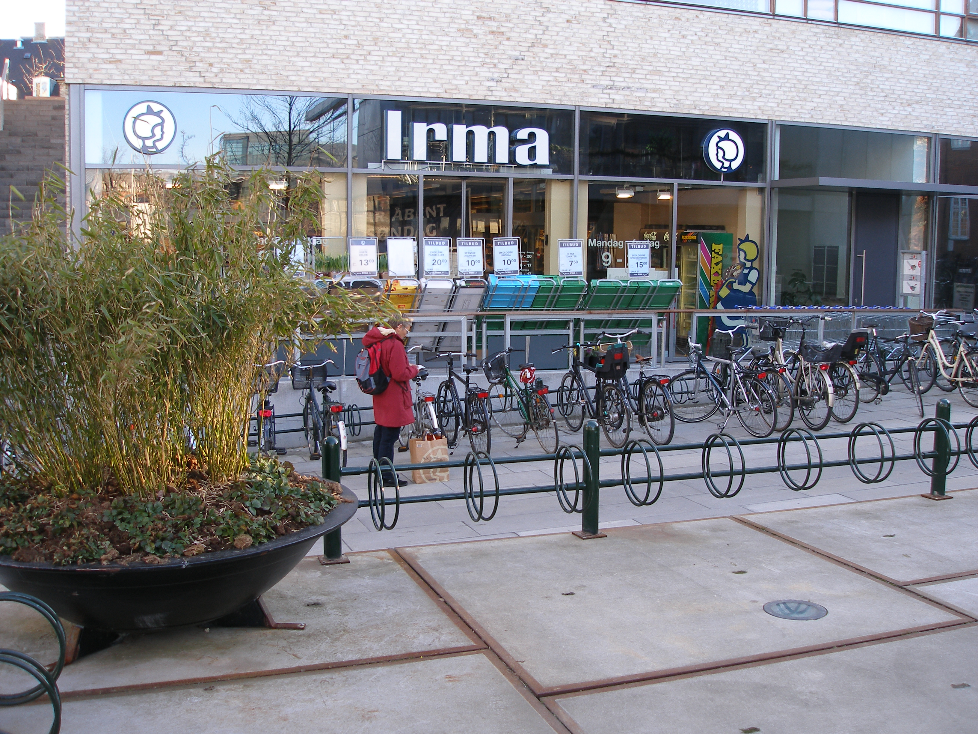 Danish supermarket: Irma, Falkonér Plads, Sylows Allé, Frederiksberg